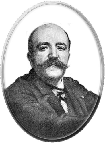 Gheorghe Bengescu (n. 30 august/13 septembrie 1848, Craiova - d. 23 august 1921, Paris)